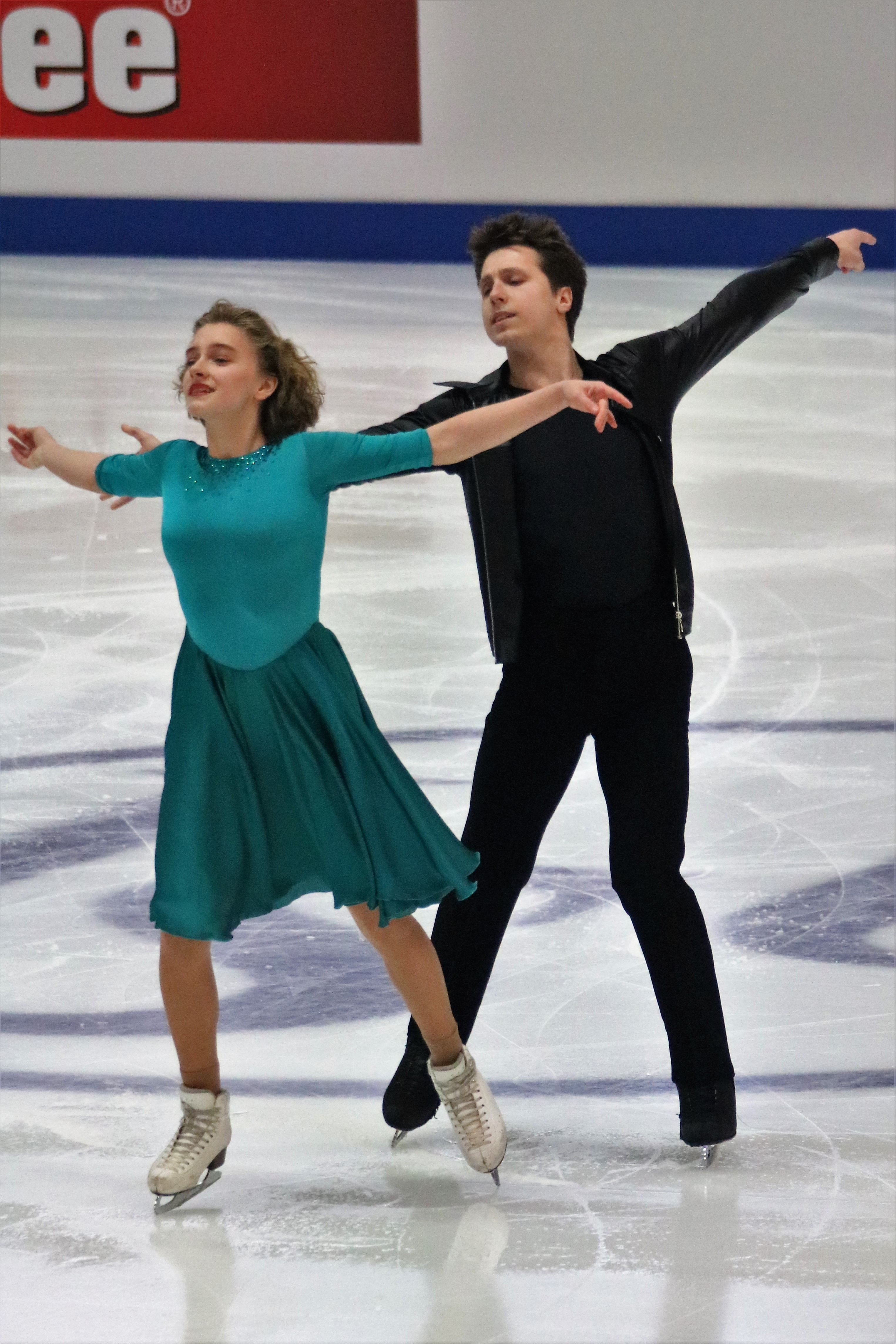 Эмилия Колеганова и Владислав Полховский (Беларусь) на чемпионате Европы по фигурному катанию 2020